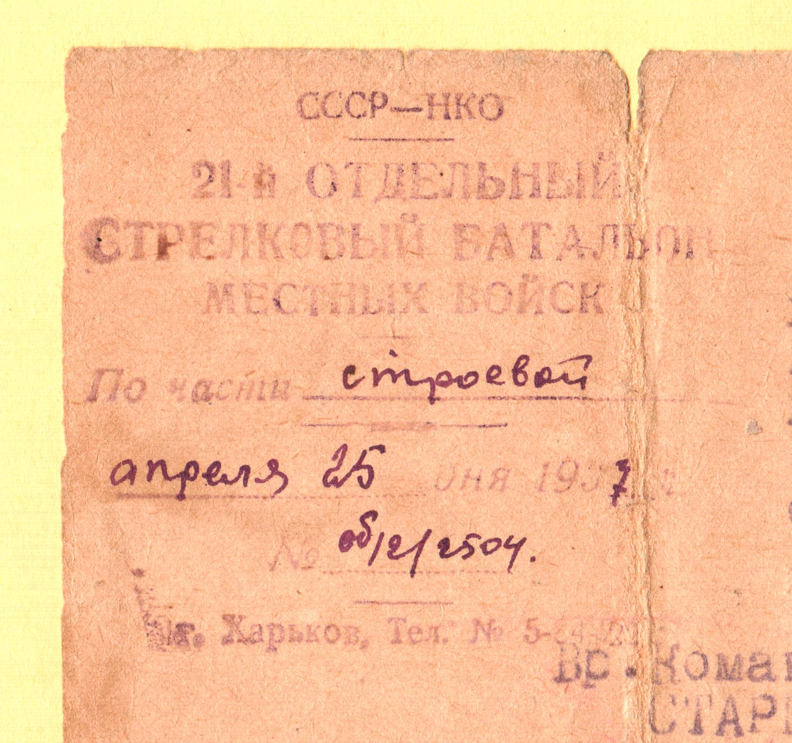 USRR Army (RKKA) in Kharkov document, 1937. 21-й отдельный стрелковый батальон местных войск (Харьков) - угловой штамп. 1937. Текст стандартный.